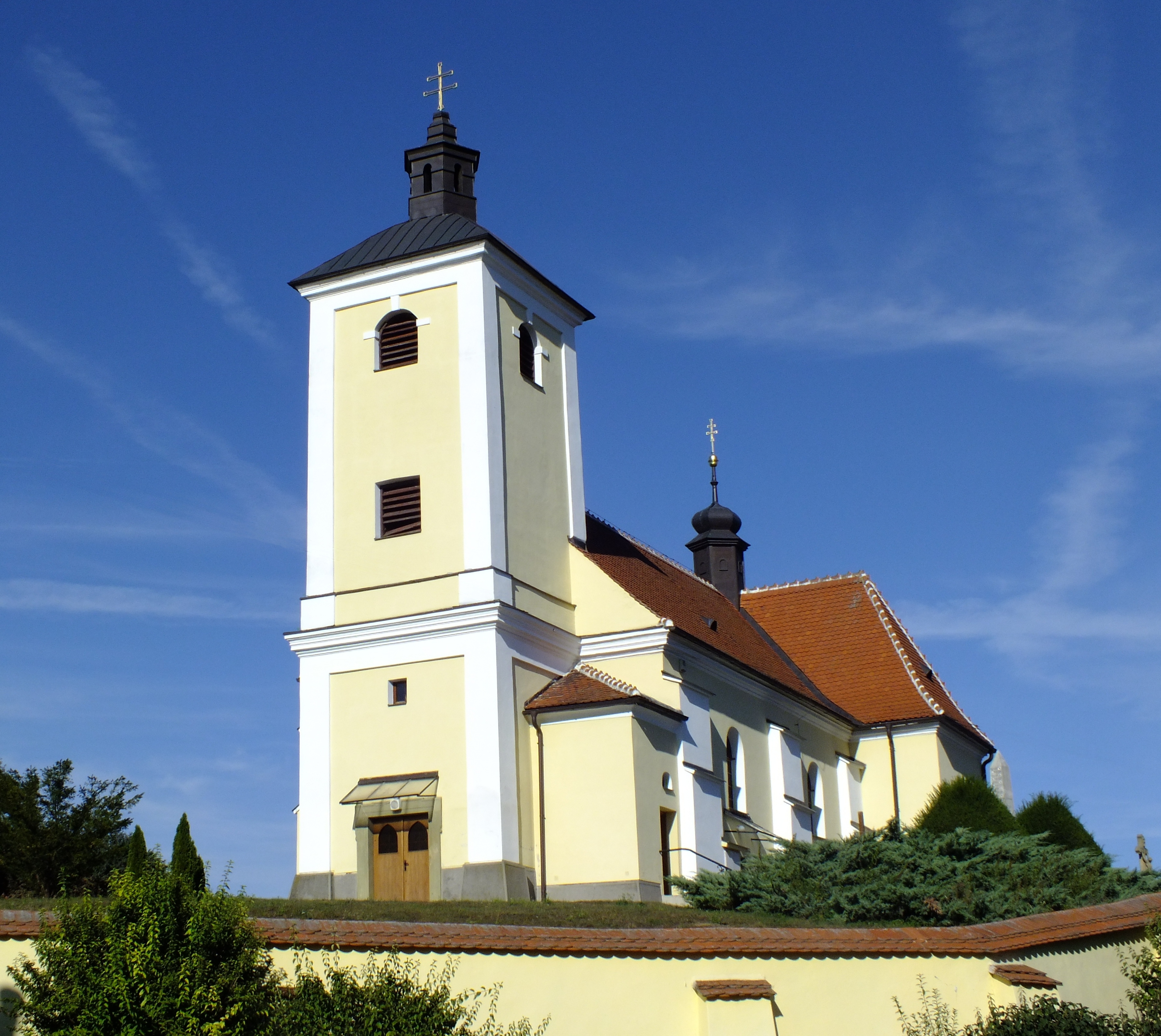 Kostel Všech svatých (Hradčovice), Hradčovice